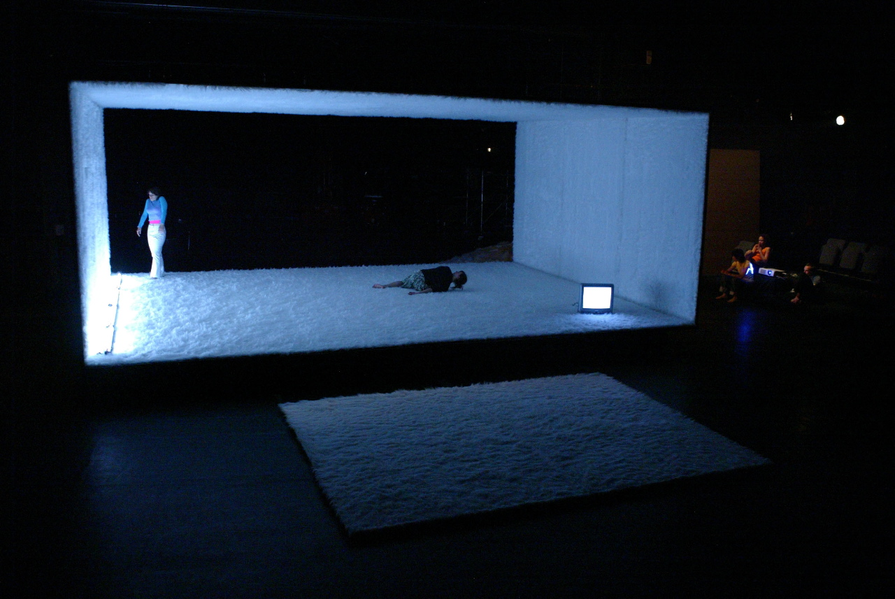 Die 2004 von Saskia Höbling entworfene Choreografie superposition corps